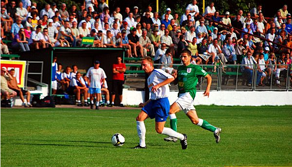 mezcj